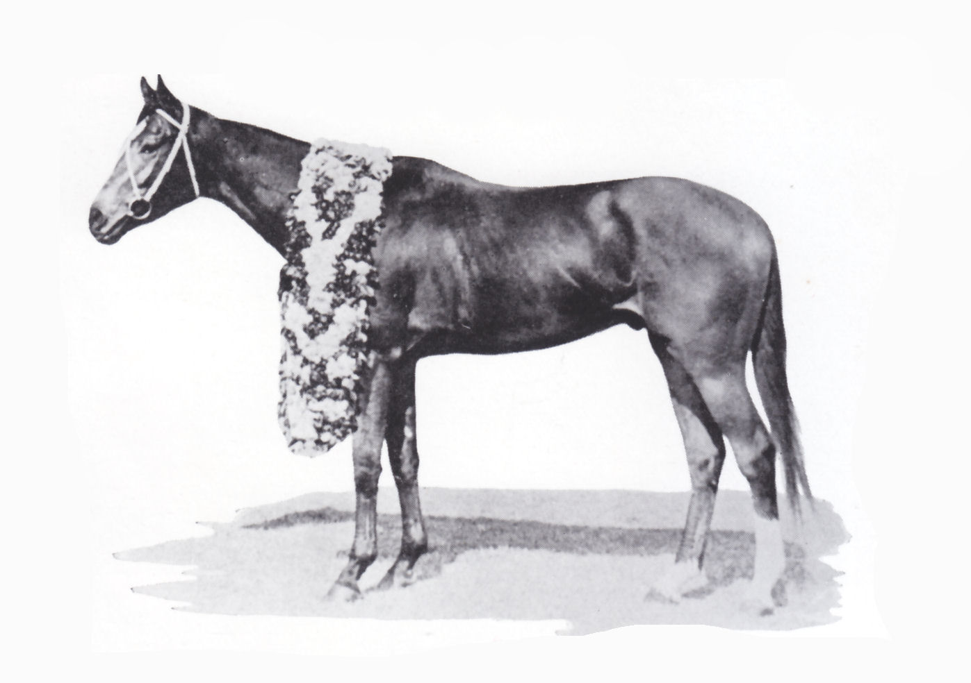 トサミドリ